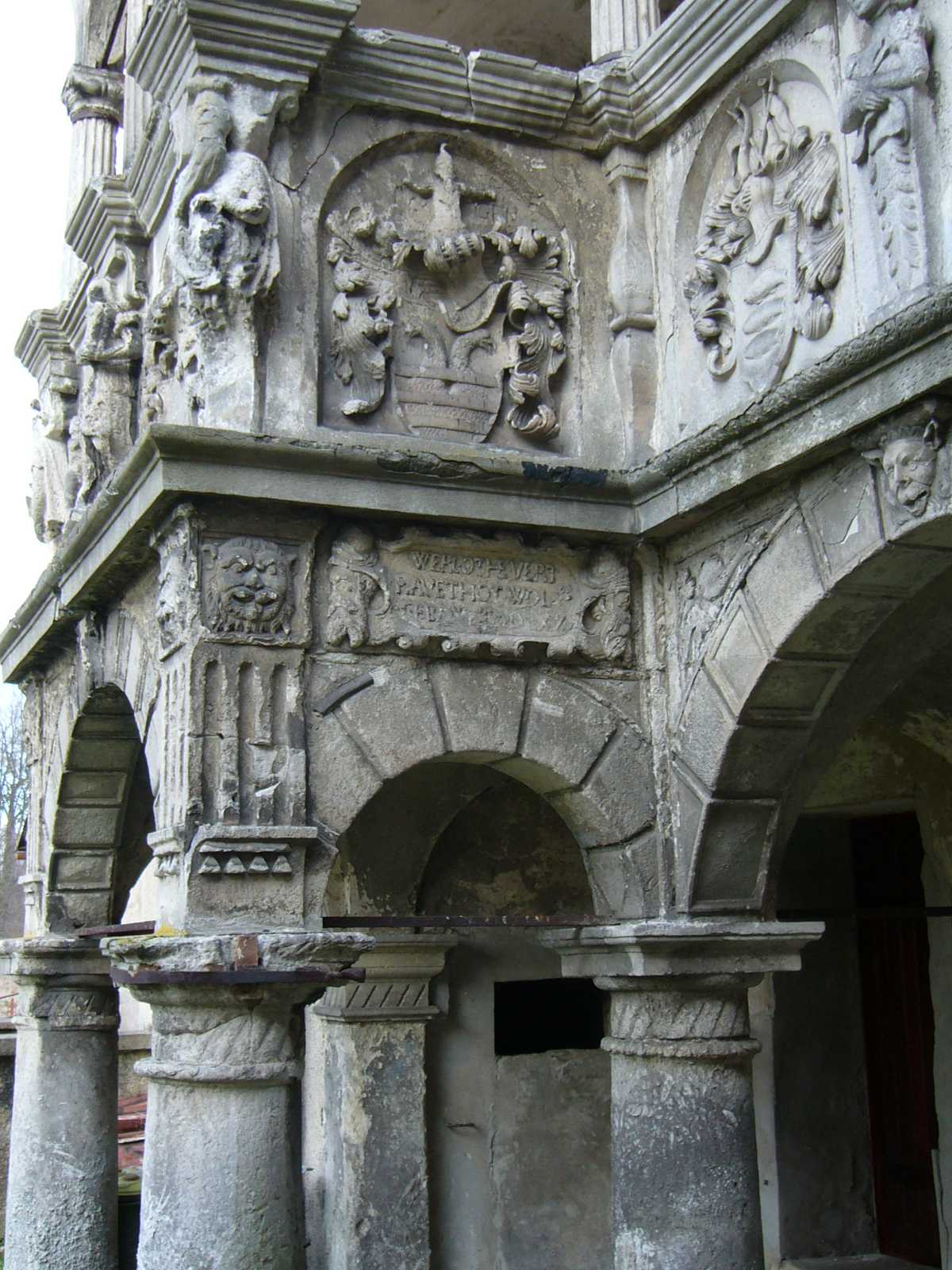 Nawojów Łużycki, renesansowe krużganki, pozostałość po dawnym dworze, cześć w ruinie